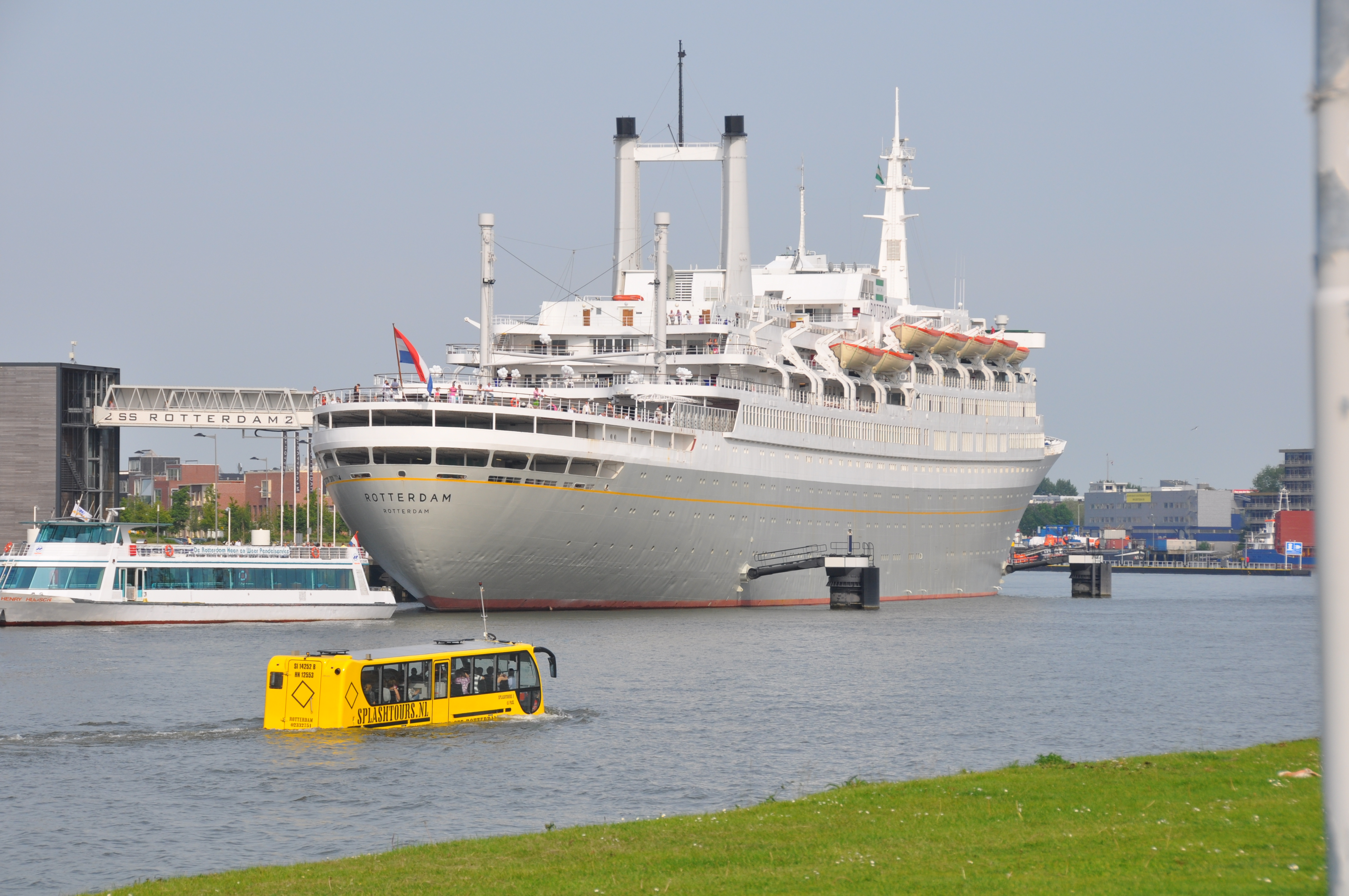 De ROTTERDAM op haar ligplaats in de Maashaven te Rotterdam, met de SPLASHTOURS I op de voorgrond